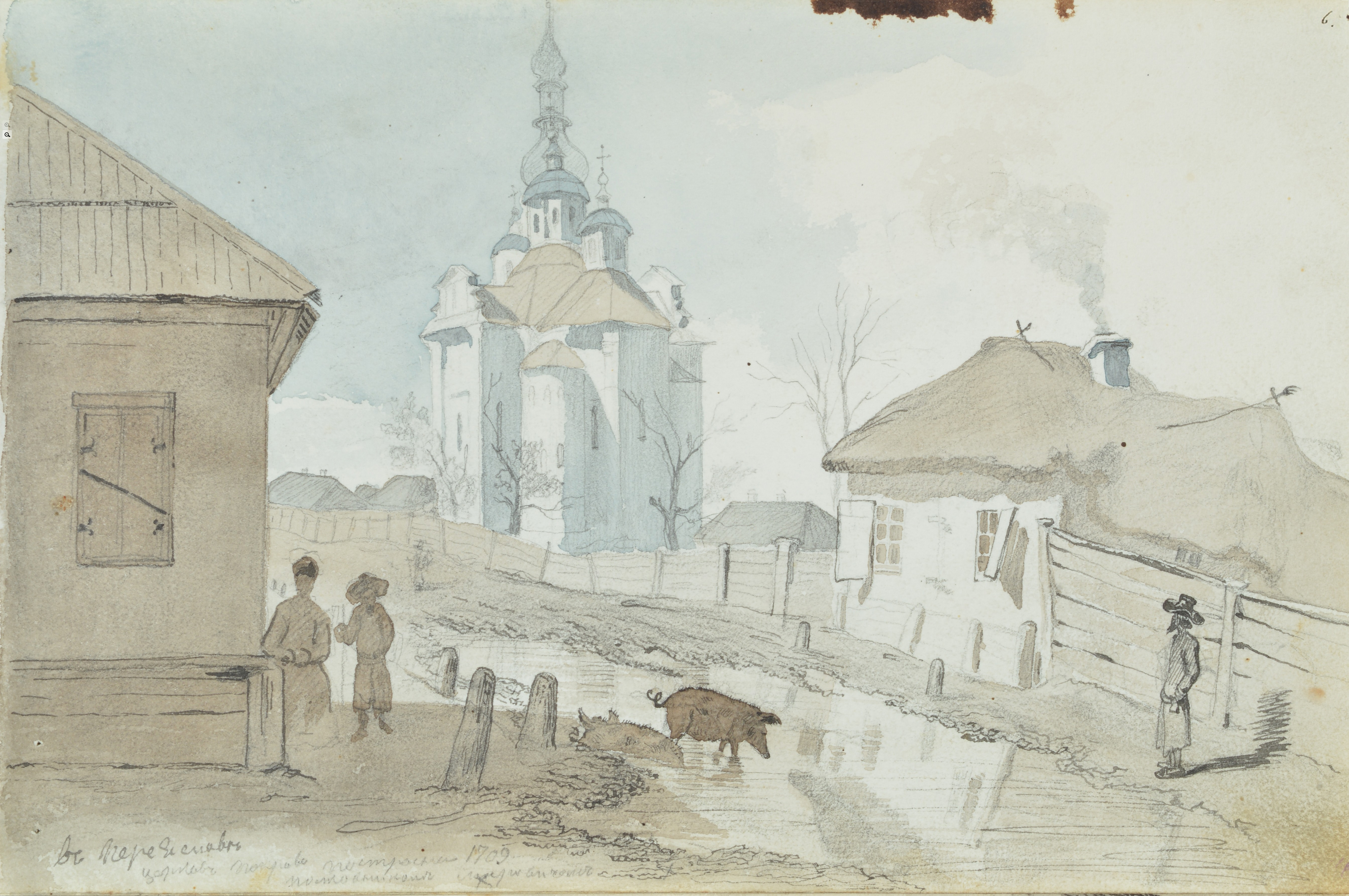 Тарас Шевченко. Альбом 1845 р. Арк. 6. Церква Покрови в Переяславі збудована 1704-1709 рр. полковником Мировичем. Якби-то ти, Богдане п’яний, Тепер на Переяслав глянув... (18 серпня 1859 р. В Переяславі)